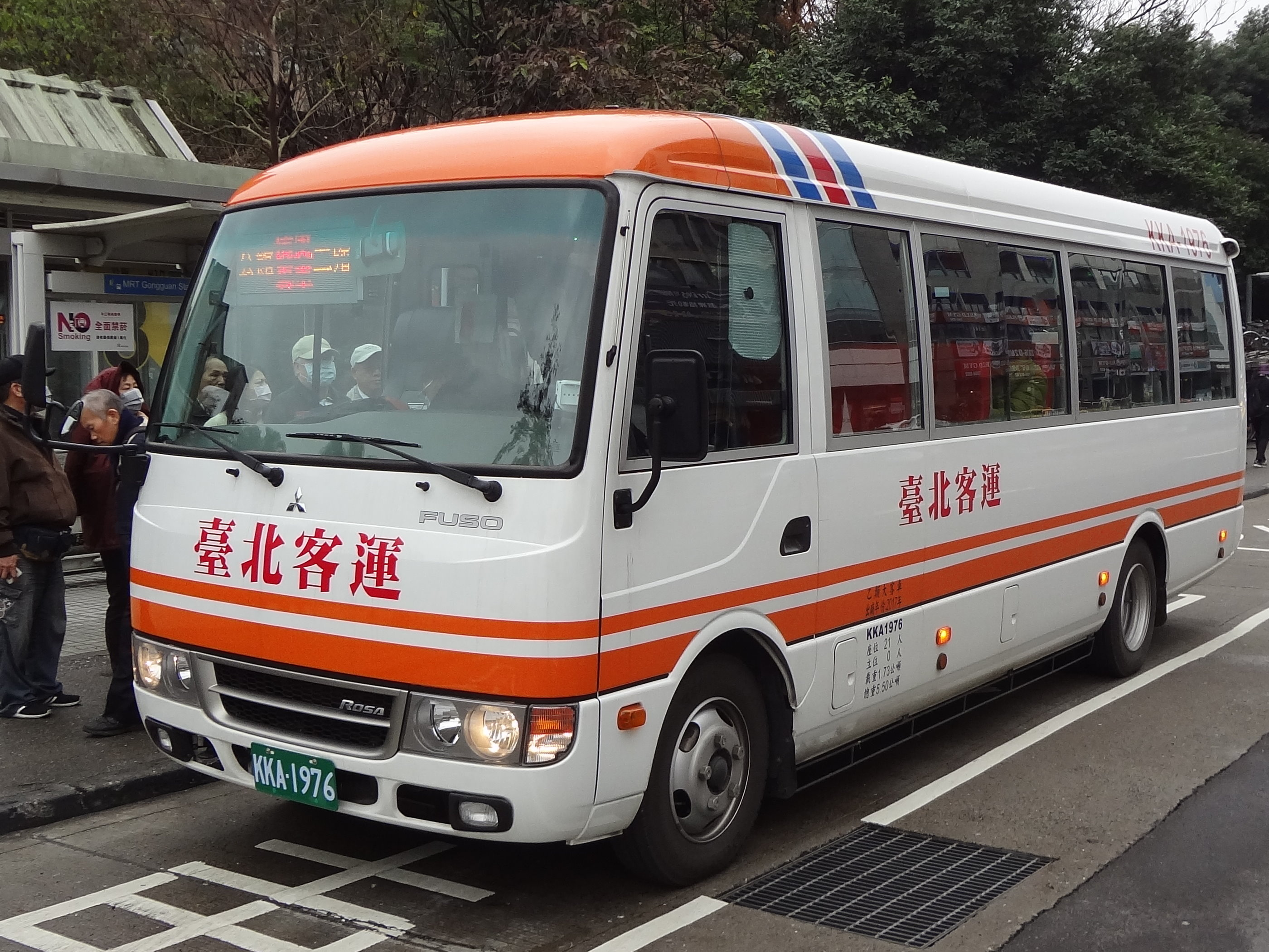 臺北客運Fuso Rosa中型巴士KKA-1976行駛臺北市殯葬管理處懷恩專車，停靠臺北捷運公館站。